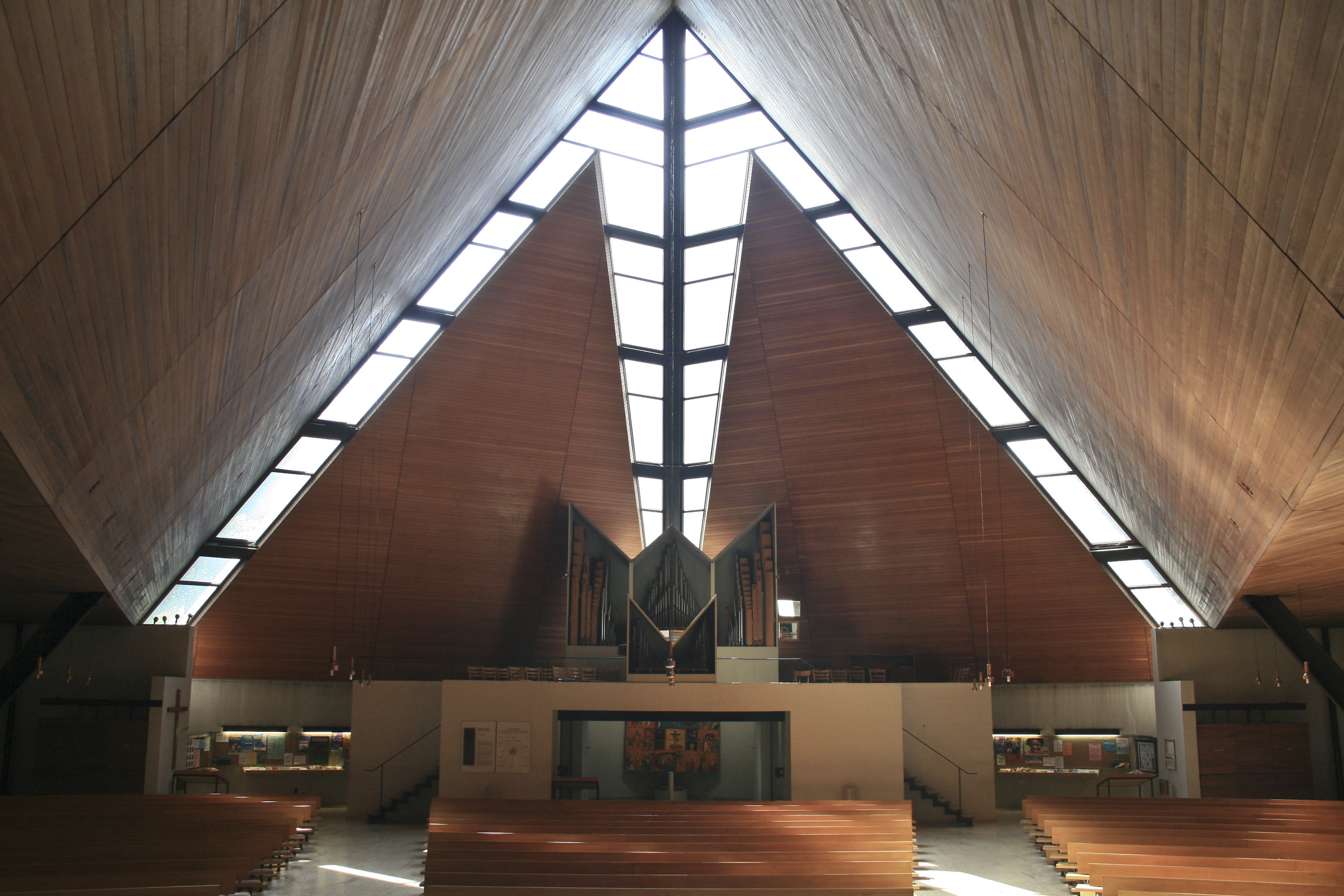 Kath. Pfarrkirche Lehen, hl.Vinzenz Pallotti